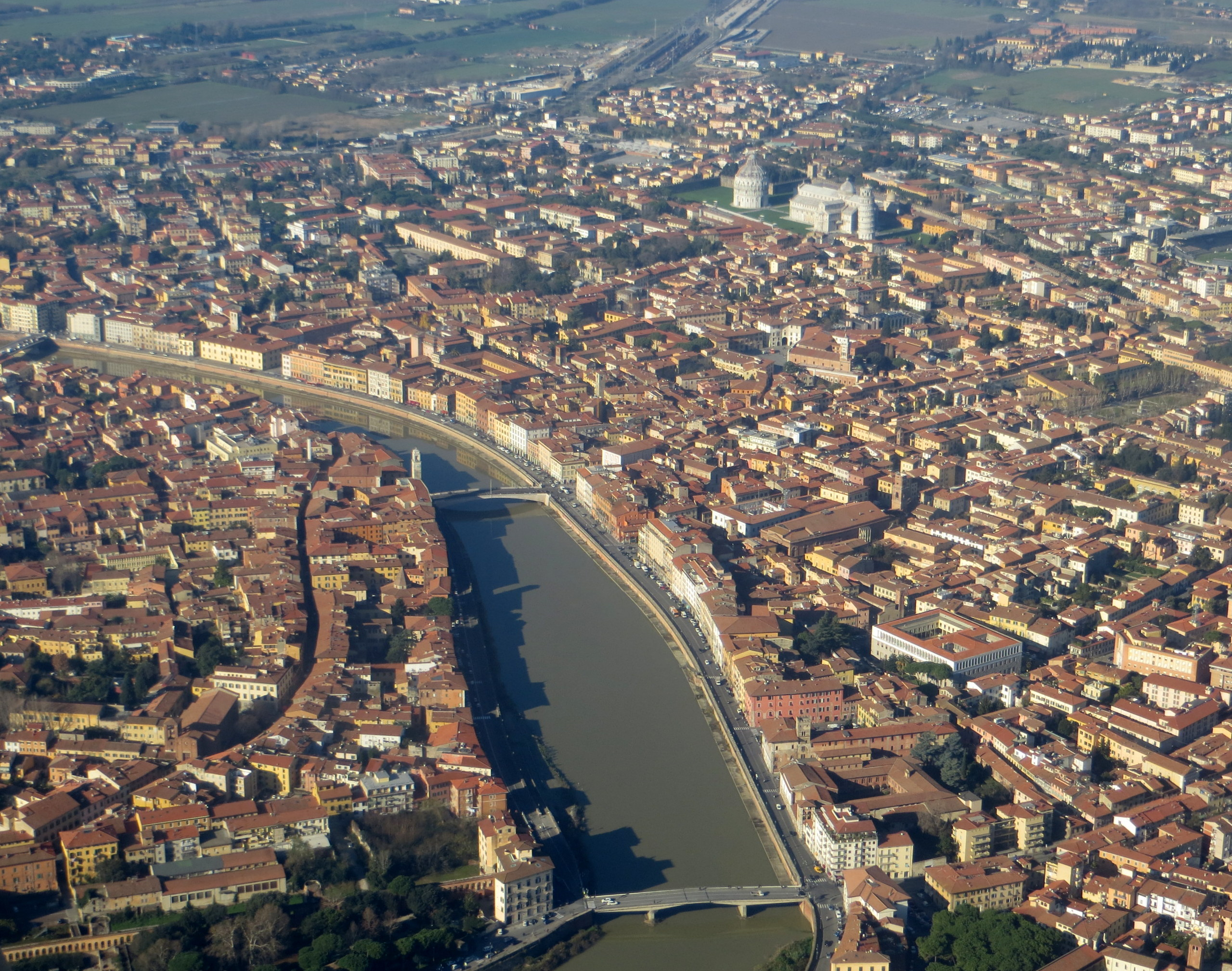 Veduta di Pisa dall'aereo